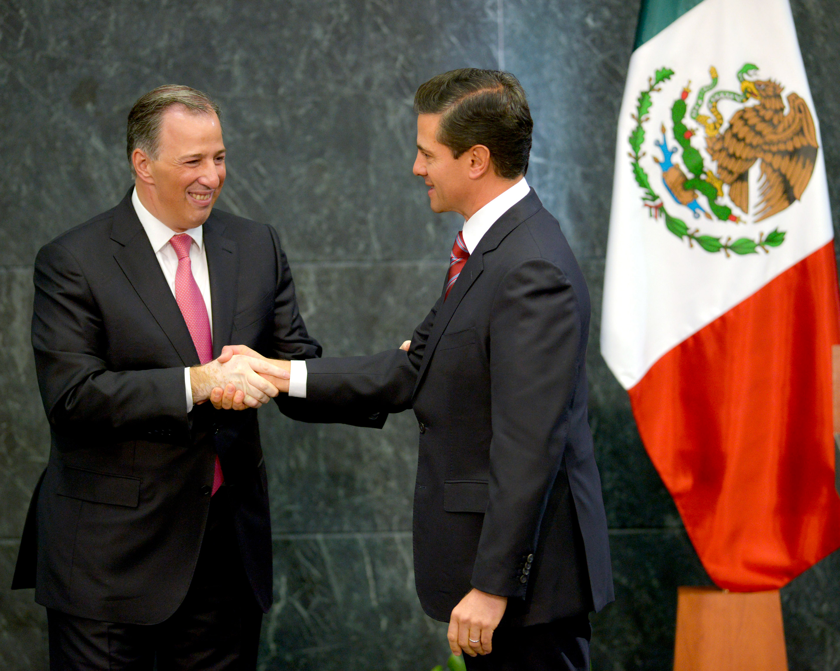 El Presidente Enrique Peña Nieto anunció la renuncia del Doctor José Antonio Meade, como Secretario de Hacienda y Crédito Público. Su lugar será ocupado por el Doctor José Antonio González Anaya quien fungía como Director General de PEMEX. El Maestro Carlos Alberto Treviño Medina, será el nuevo titular de Petróleos Mexicanos.